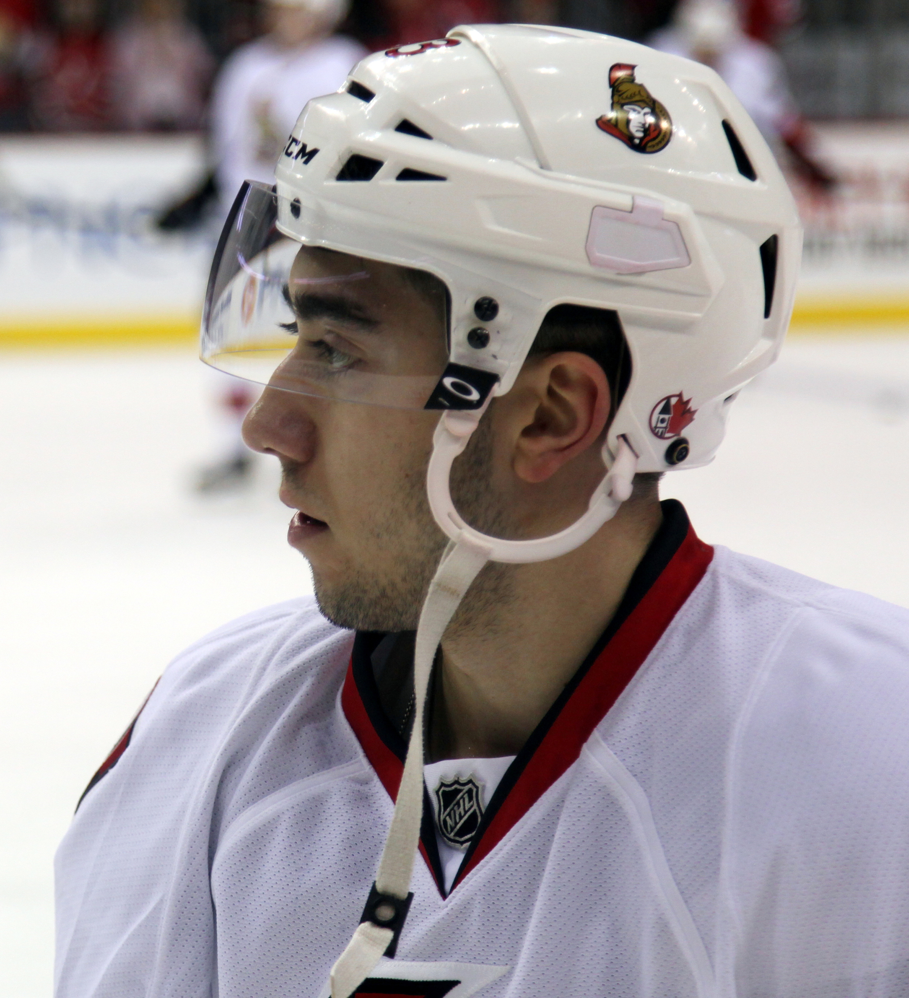 Zibanejad in 2013.